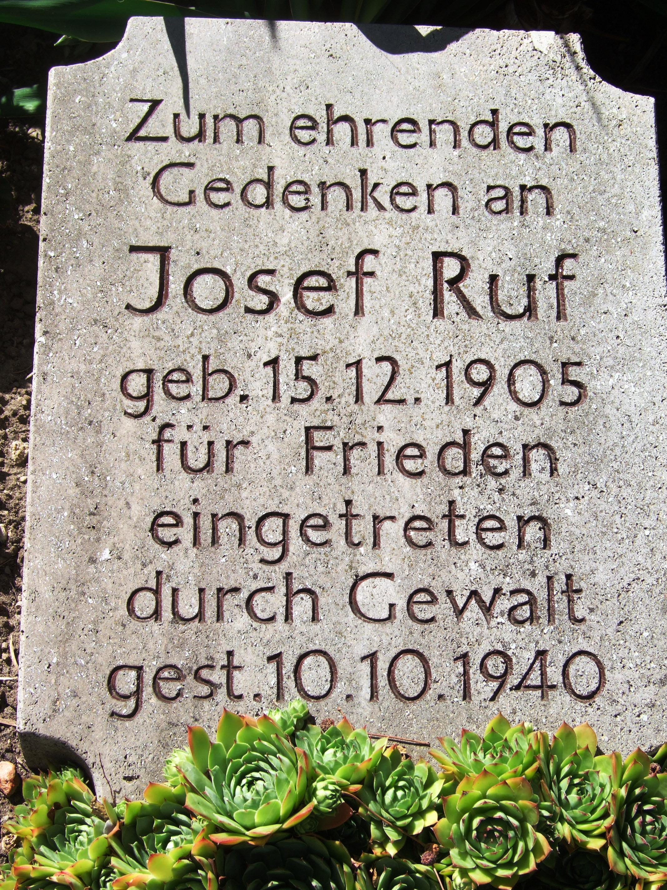 Ruf, Joseph (1905-1940) - Gedenkstein bei der Kirche Hochberg bei Bad Saulgau (Deutschland, Baden-Württemberg)